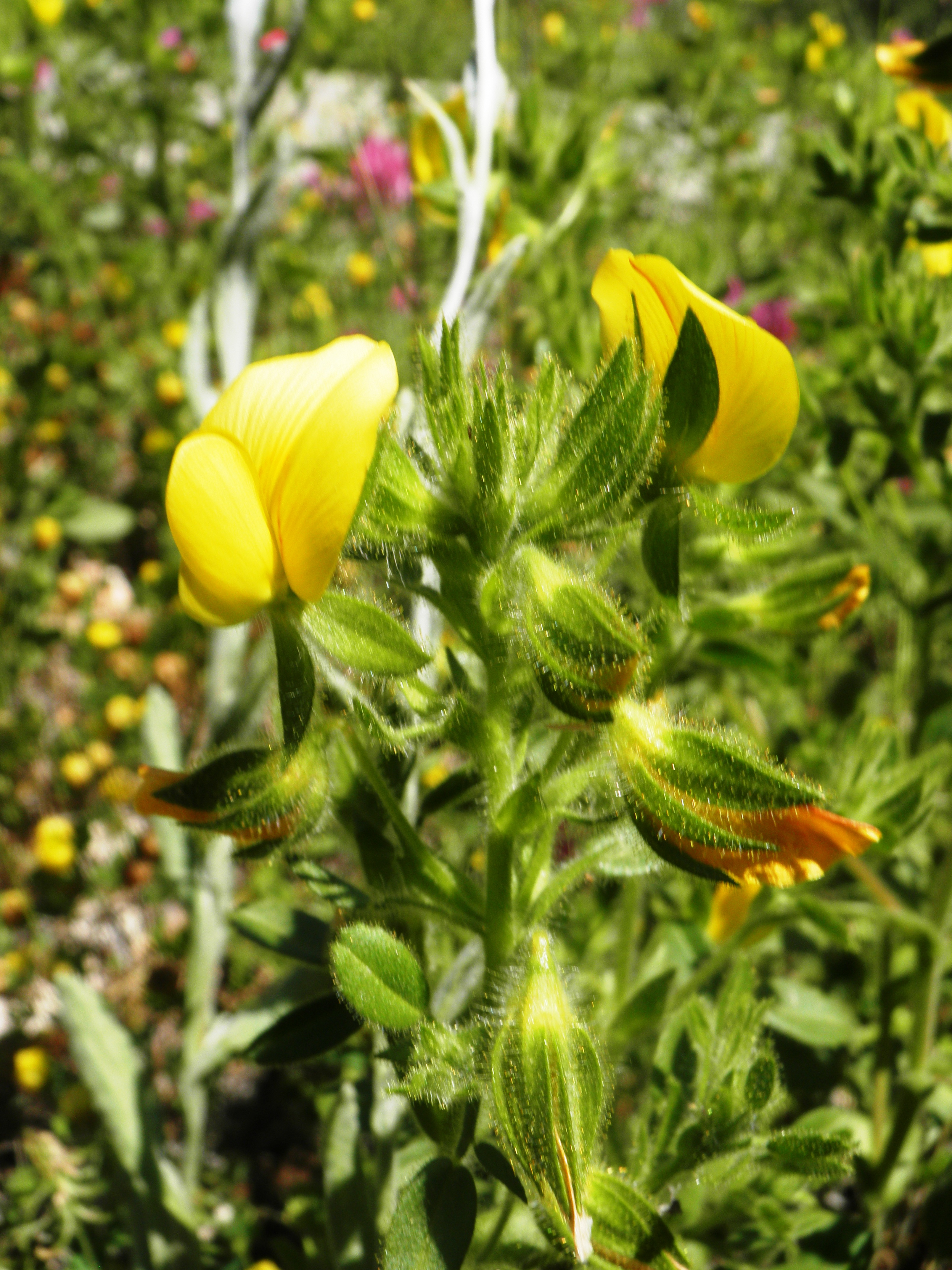 שברק דביק